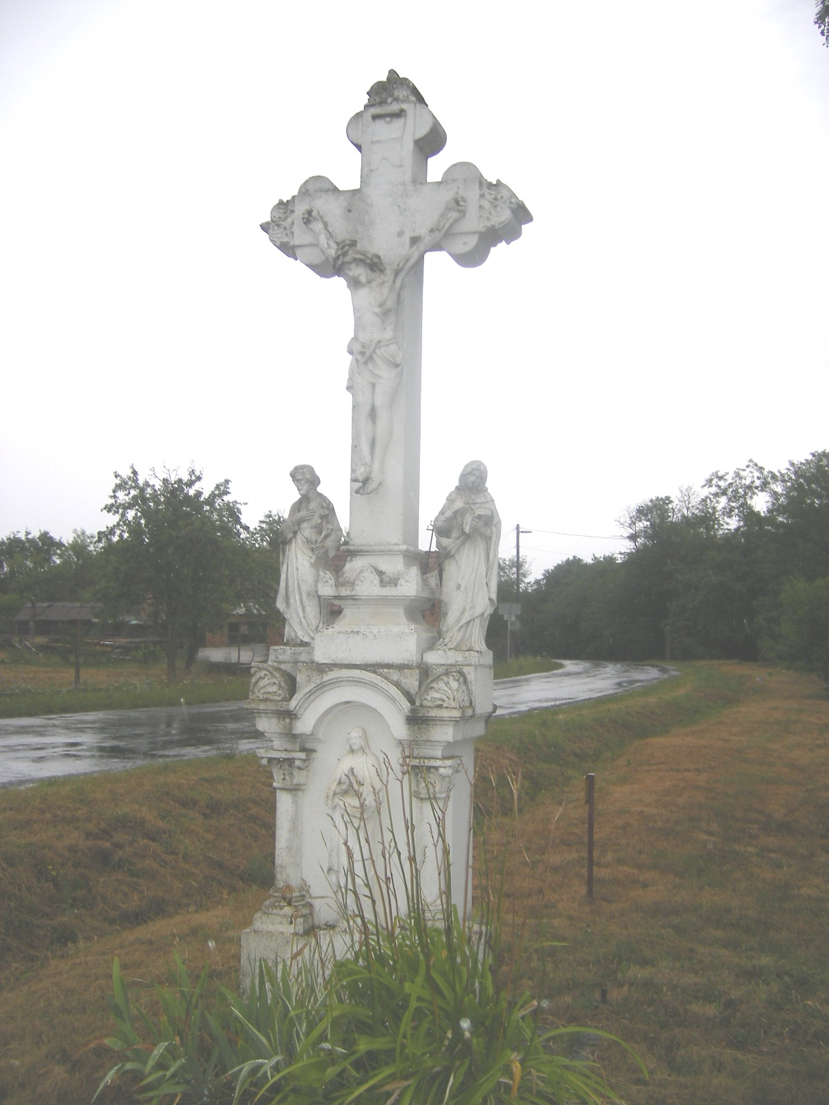 Útmenti kereszt Halastón